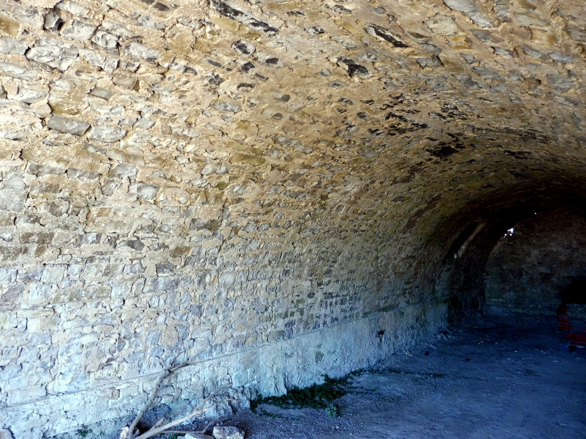 Cobert del Colom de Llindars (Ribera d'Ondara)